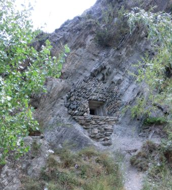 Niu de metralladora pertanyent al CR-76 (centre de resistència 76) situat a la riba esquerra del pantà de la Torrassa, a la Guingueta d'Àneu. Aquestes edificacions es van construir després de la Guerra Civil per evitar atacs dels maquis, aliats, alemanys... Forma part del Memorial Democràtic.